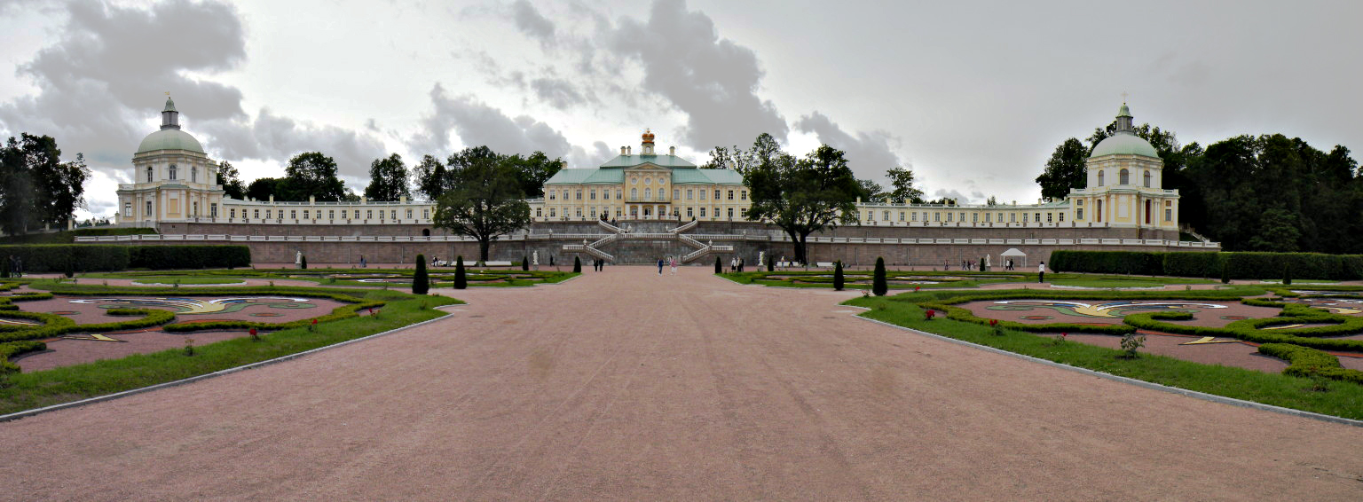 Oranienbaum . Palace